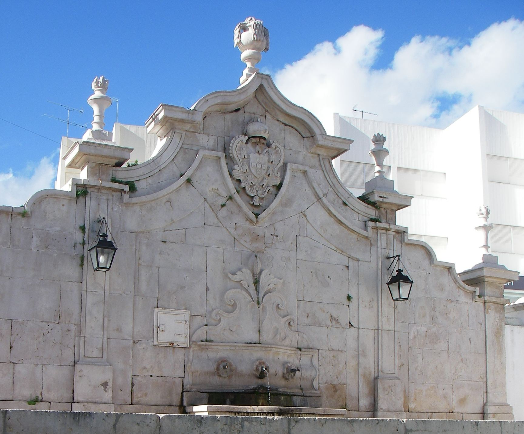 Chafariz em Arruda dos Vinhos This file was uploaded for Wiki Loves Monuments in Portugal with the unique identifier 71268.